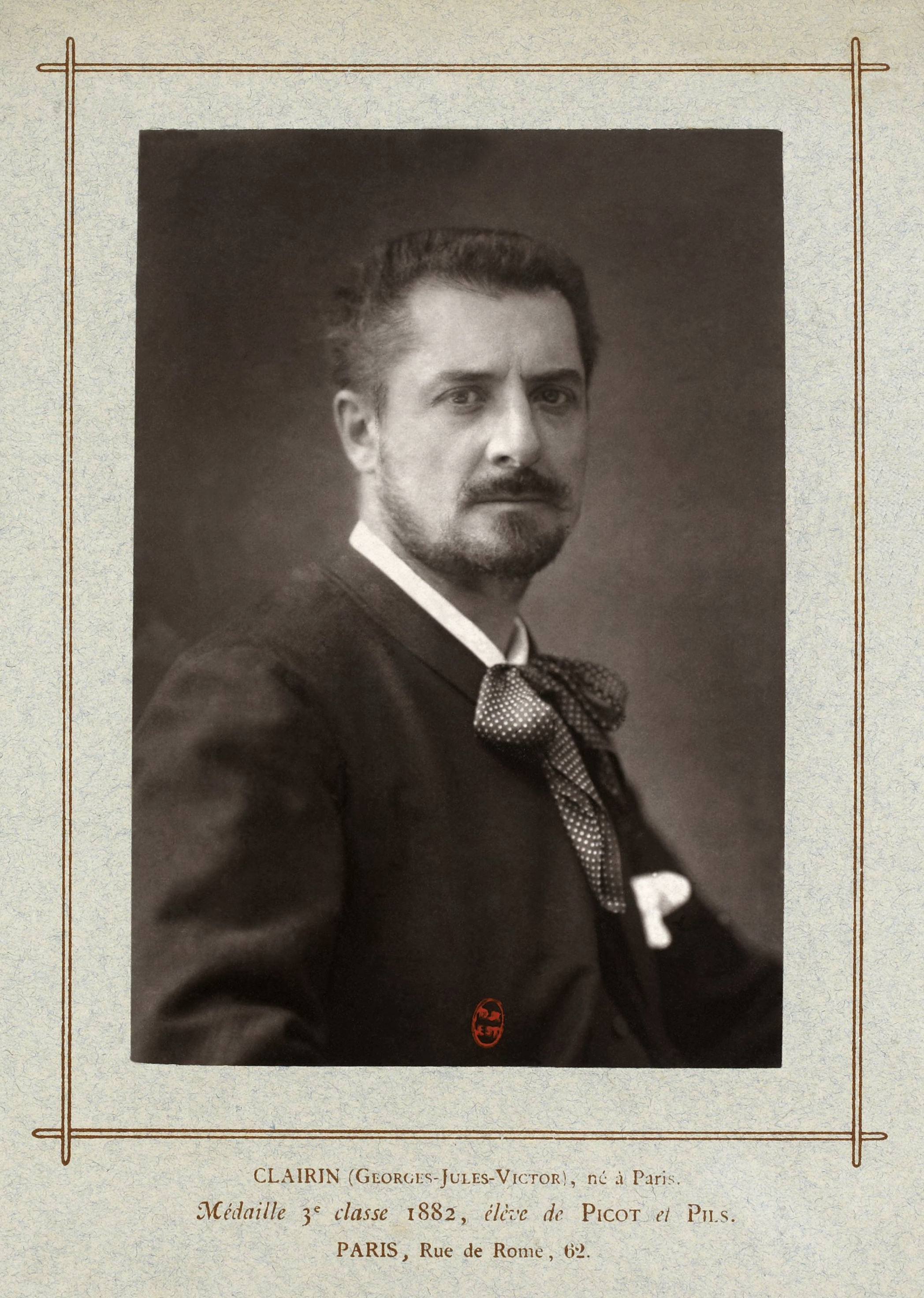 Georges Clairin (1843 - 1919), peintre français. Reproduction par photoglyptie (Woodburytype).